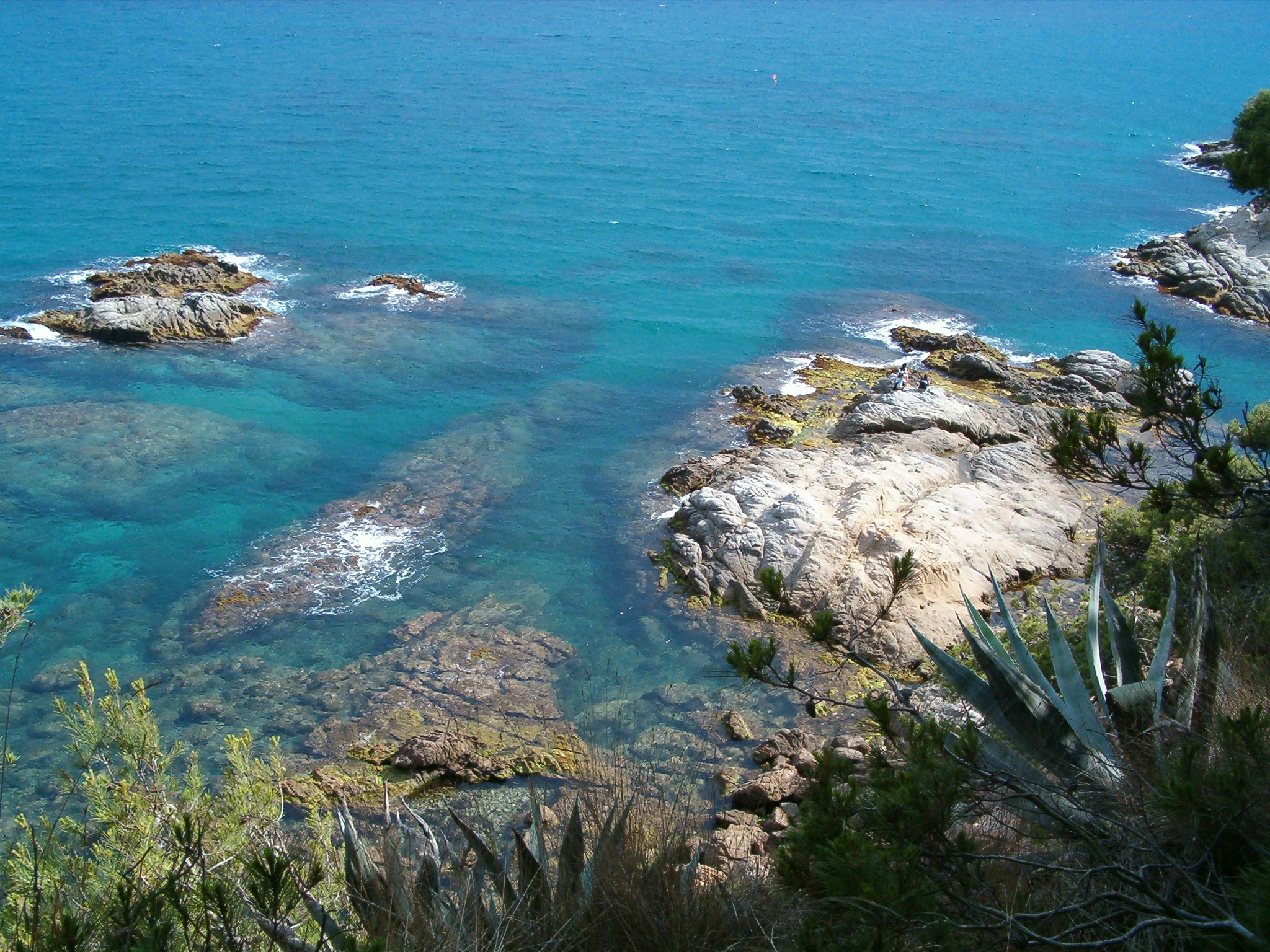 Costa Brava.